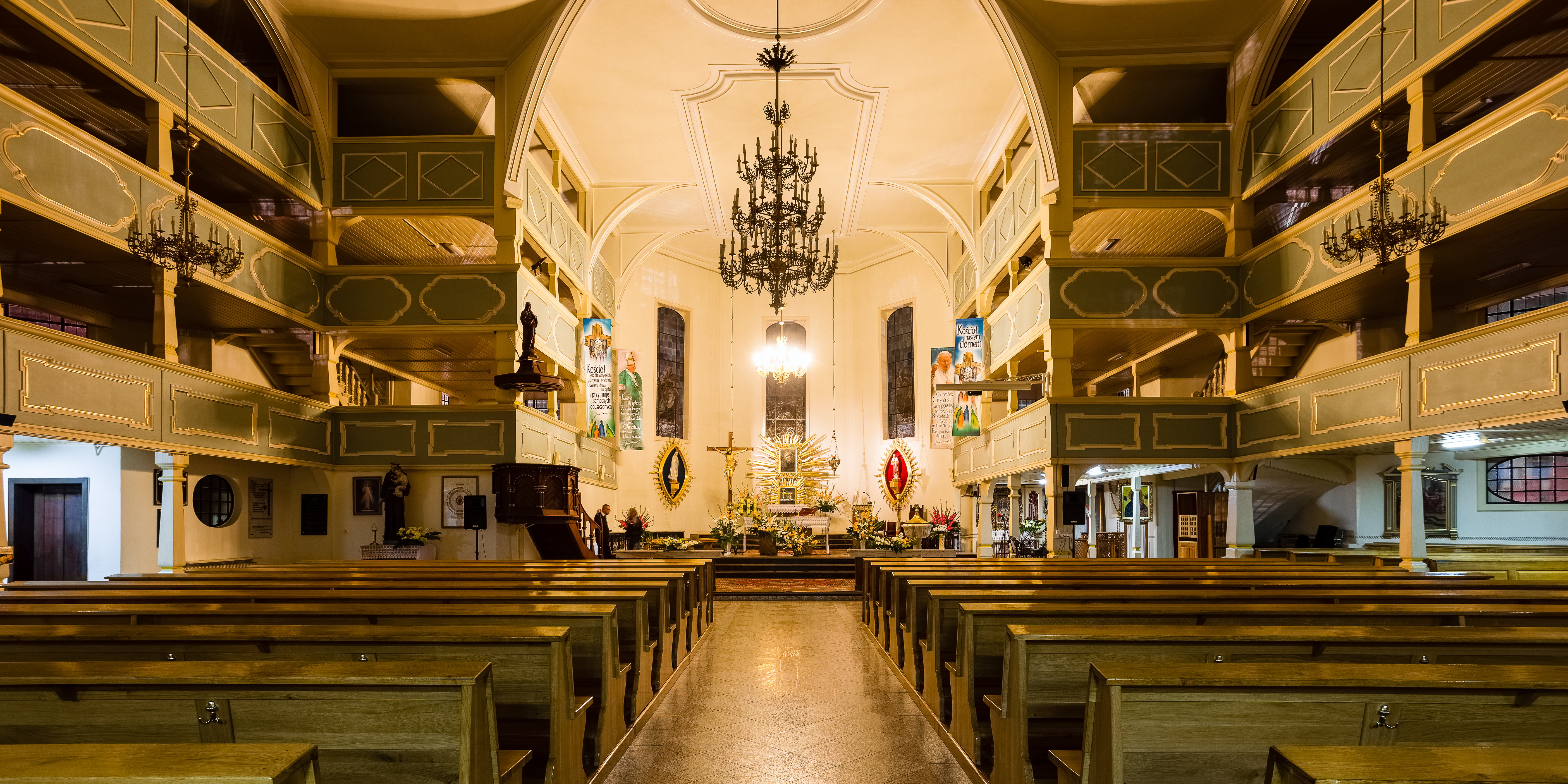 Milicz - dawny kościół ewangelicki (Kościół Łaski), ob. rzym.-kat. pom. pw. św. Andrzeja Boboli